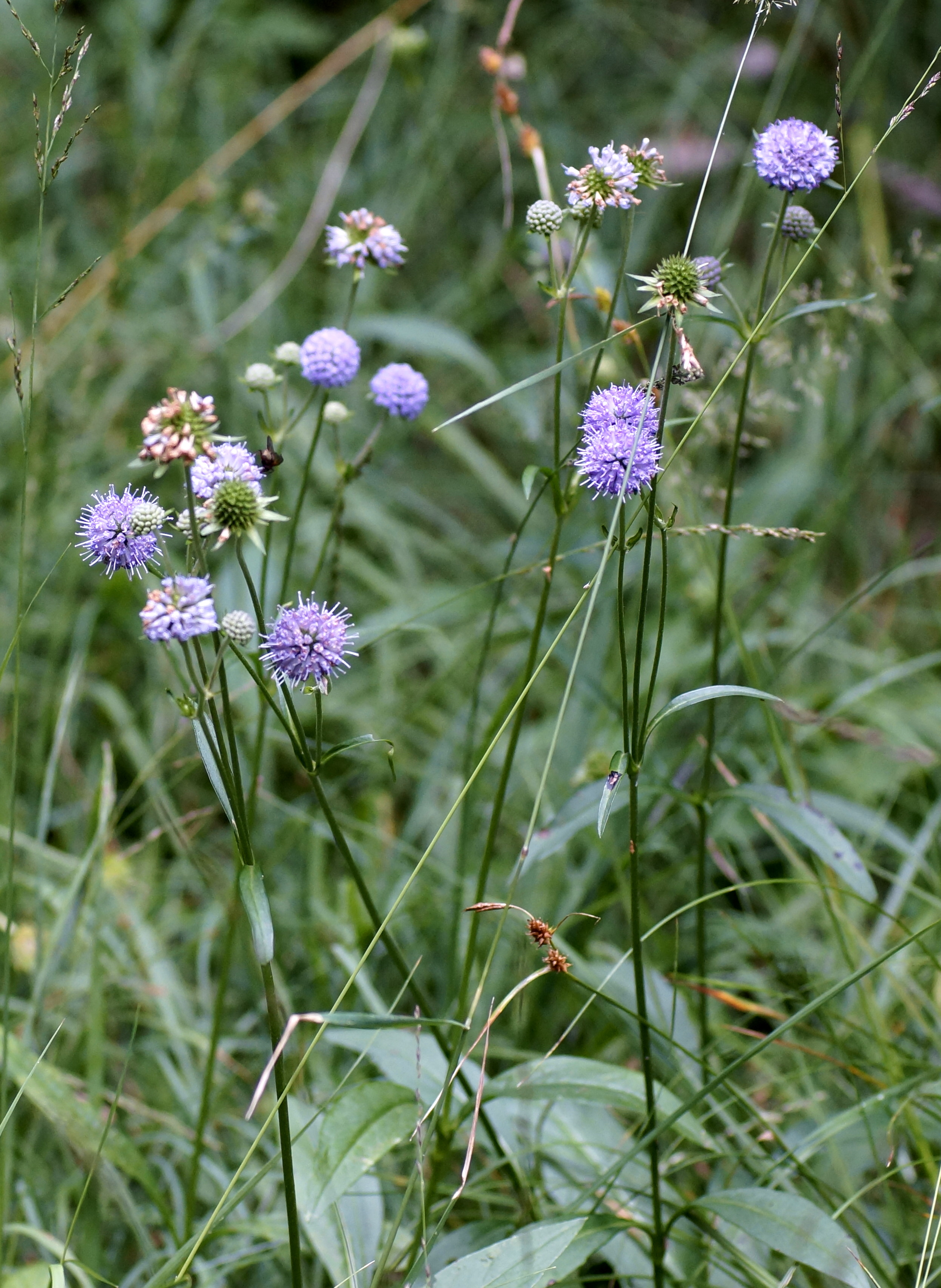 Gemeiner Teufelsabbiß, Dipsacaceae, Deutschland, Oberbayern, Mittenwald, Kranzberg, 1000 m Foto: U.Schmidt, 24.VIII.2012